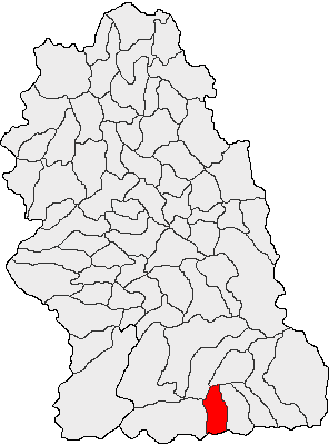 Categorie:Hărţi ale judeţului Hunedoara